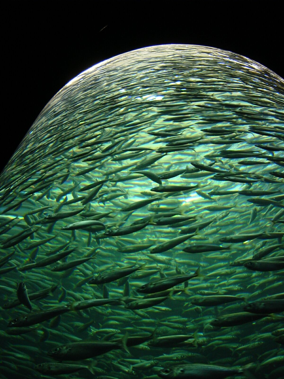 Glaszylinder mit zehntausenden Fischen im Loro Parque